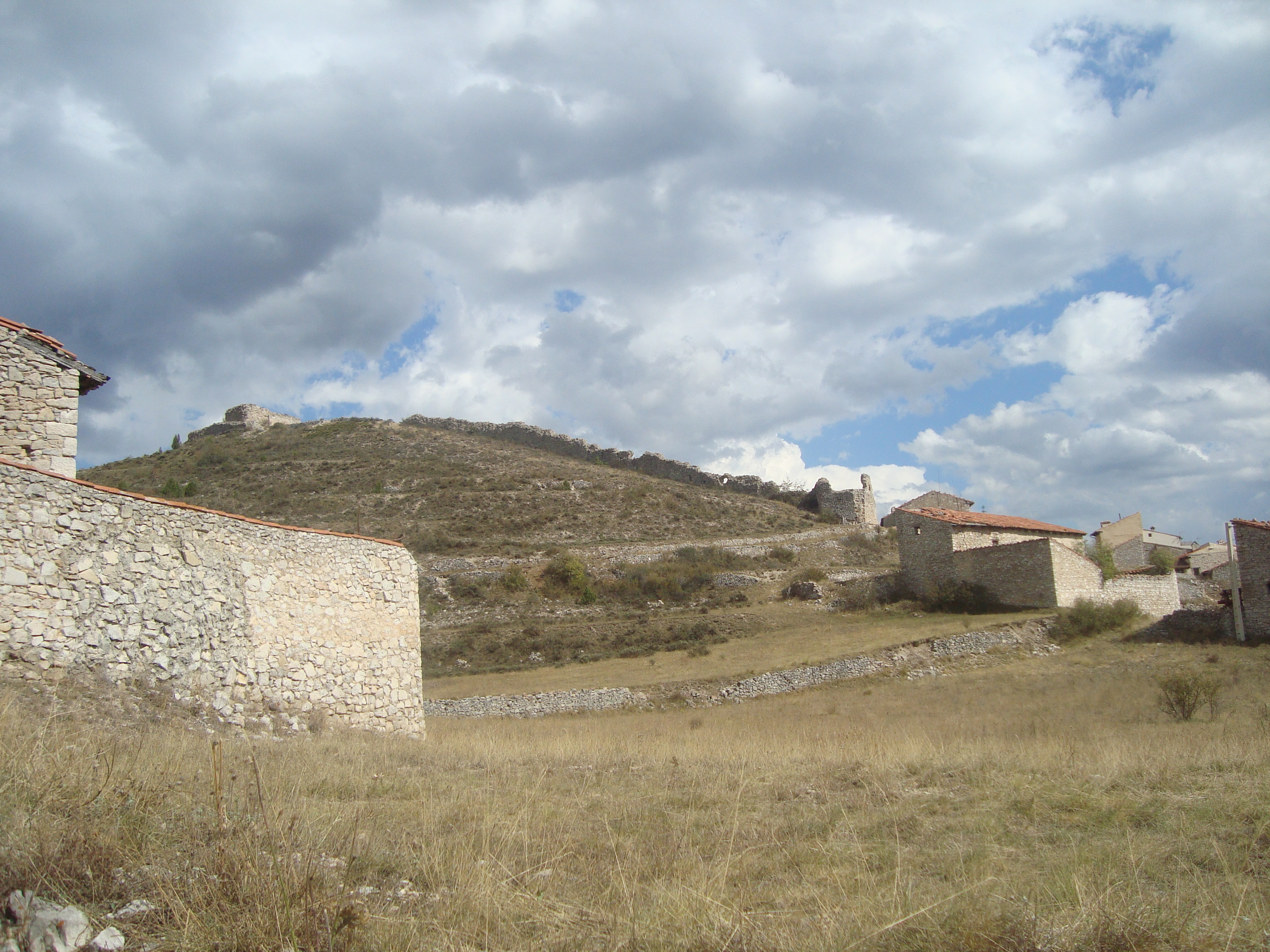 Castillo de Fontaner